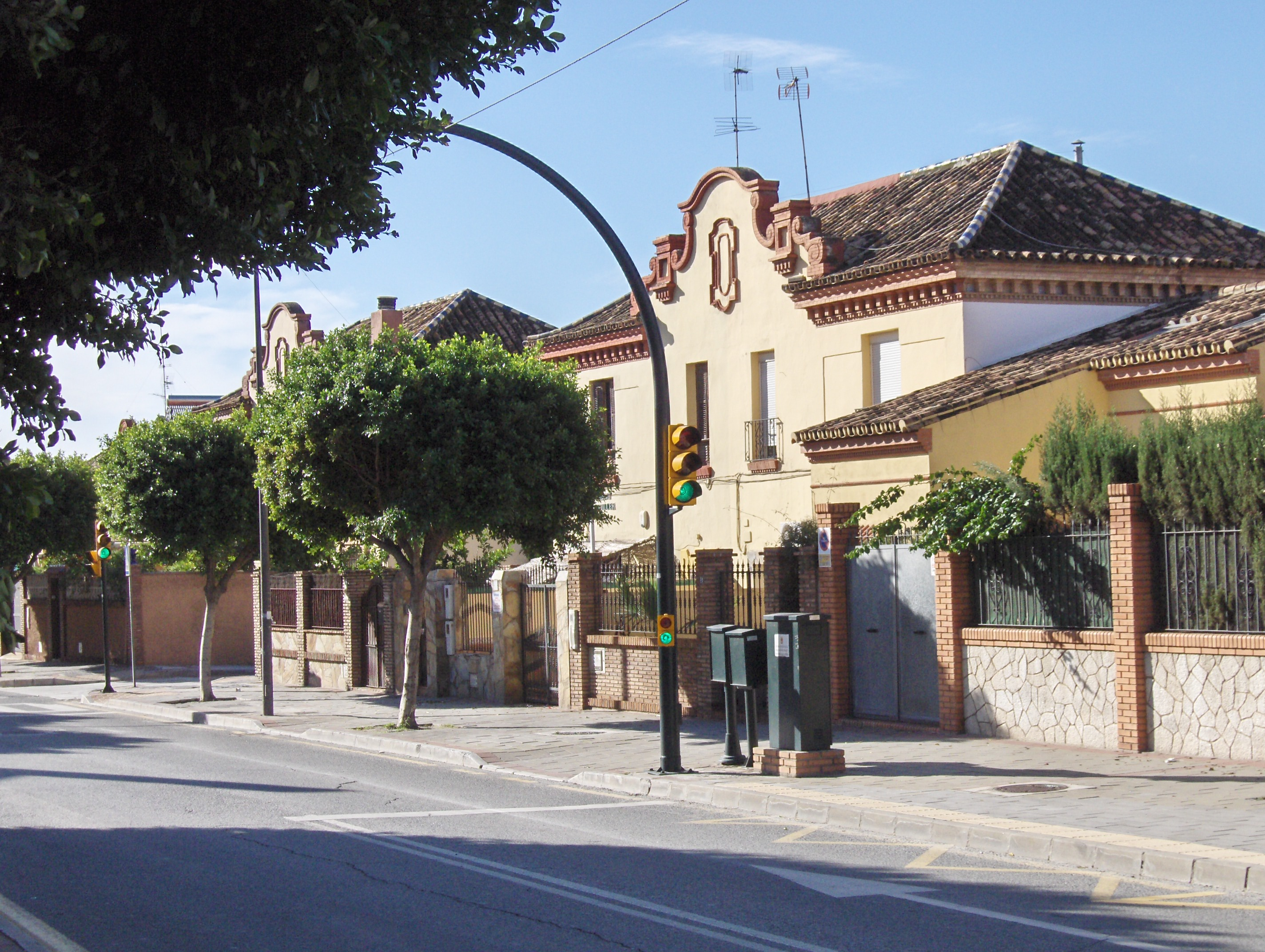 Viviendas de Ciudad Jardín, Málaga, España.